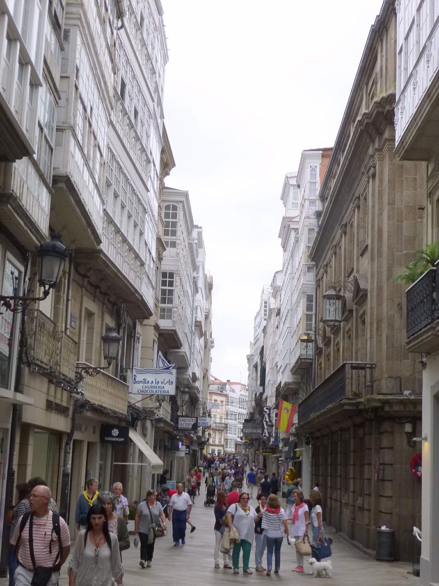 Paisaje urbano en A Coruña (Galicia, España)